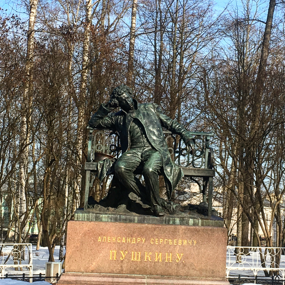 Monument to Alexander Pushkin